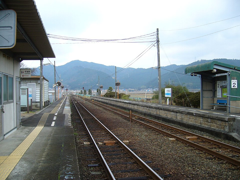 伊予石城駅構内